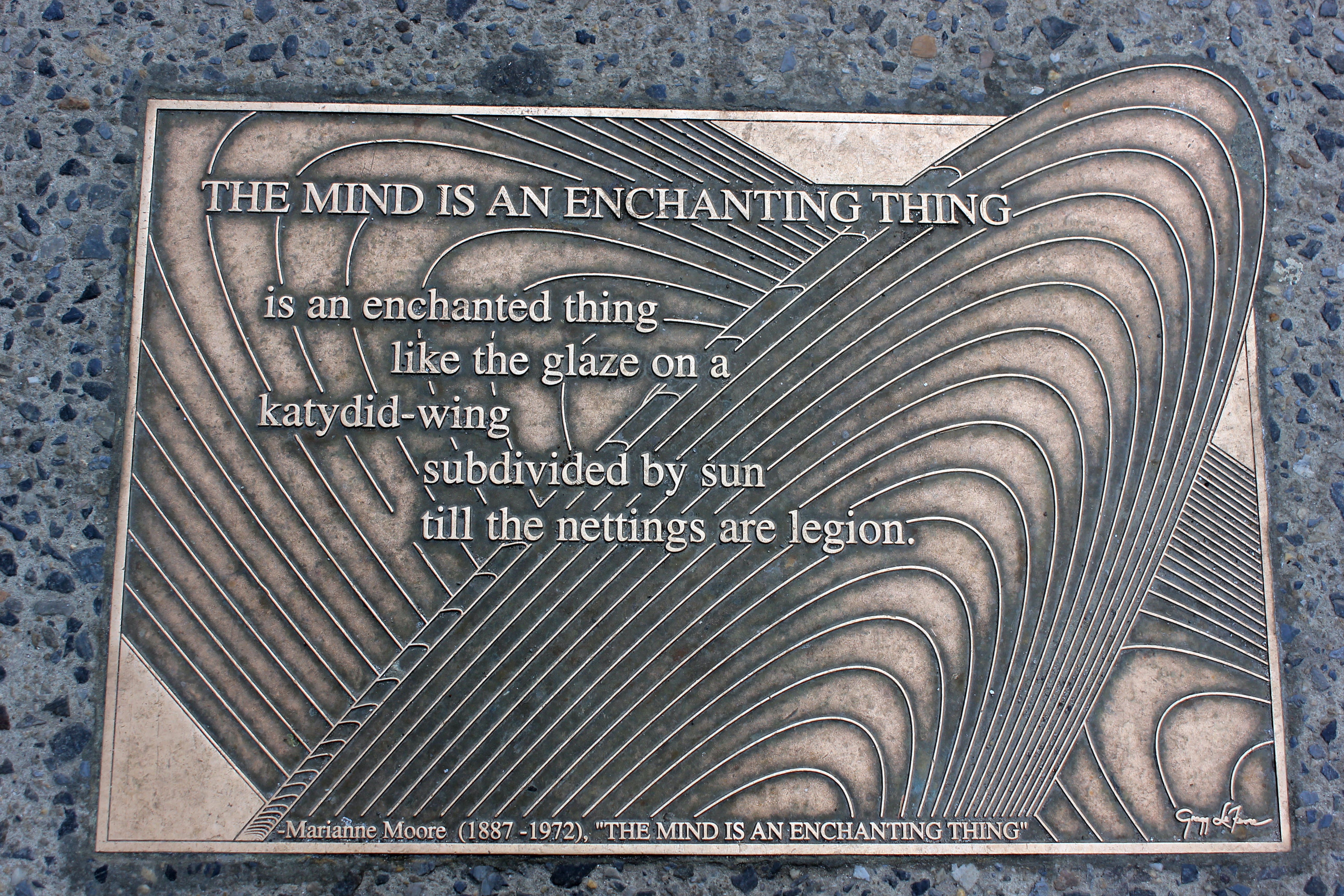 Library Walk New York City